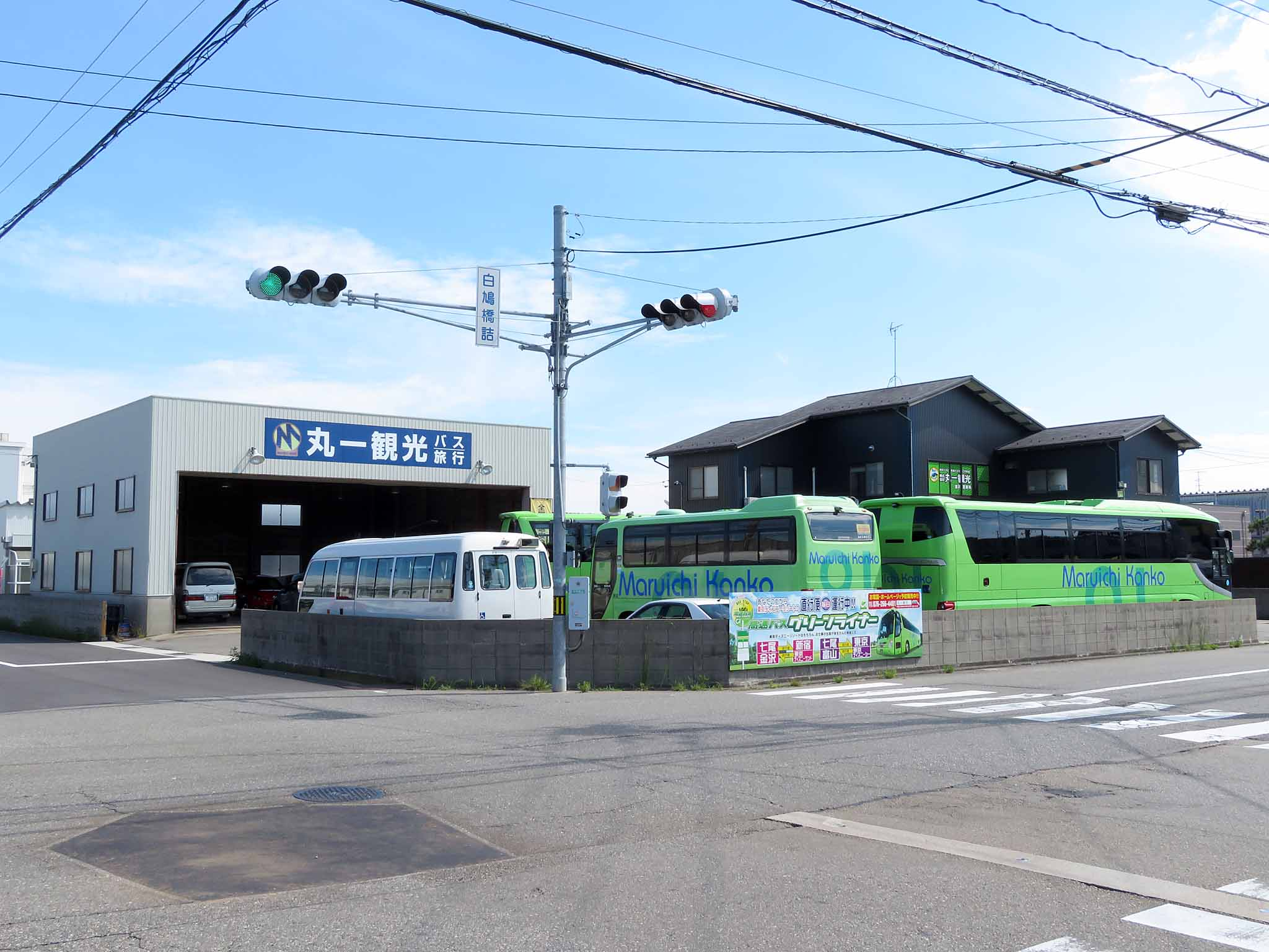 丸一観光バス金沢営業所